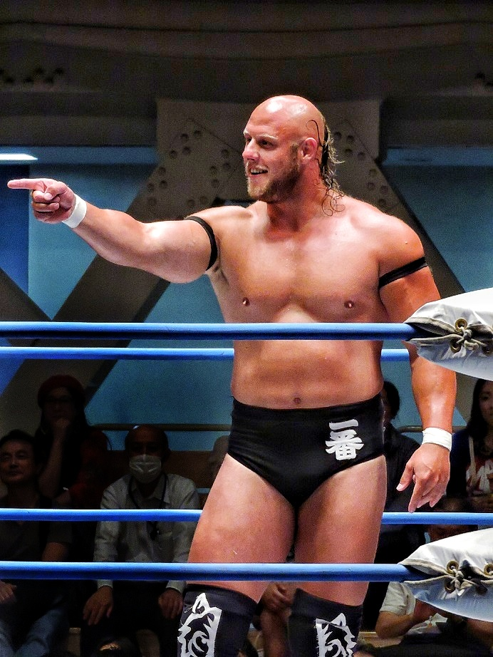 プロレスラーのディラン・ジェイムス